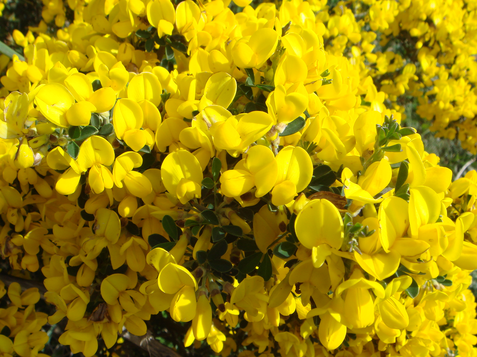 Calicotome villosa. Costa de Algeciras, Cádiz, España